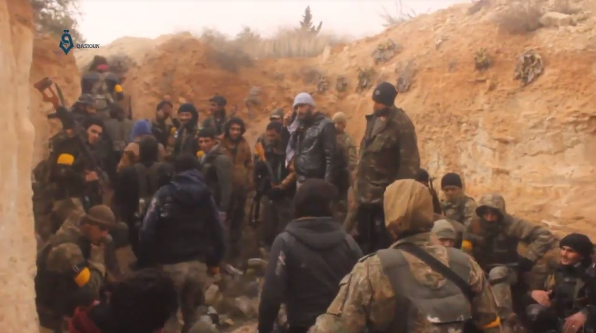 Rebelles de l'Armée syrienne libre lors de l'offensive d'Afrine contre les Kurdes des YPG, 25 janvier 2018.